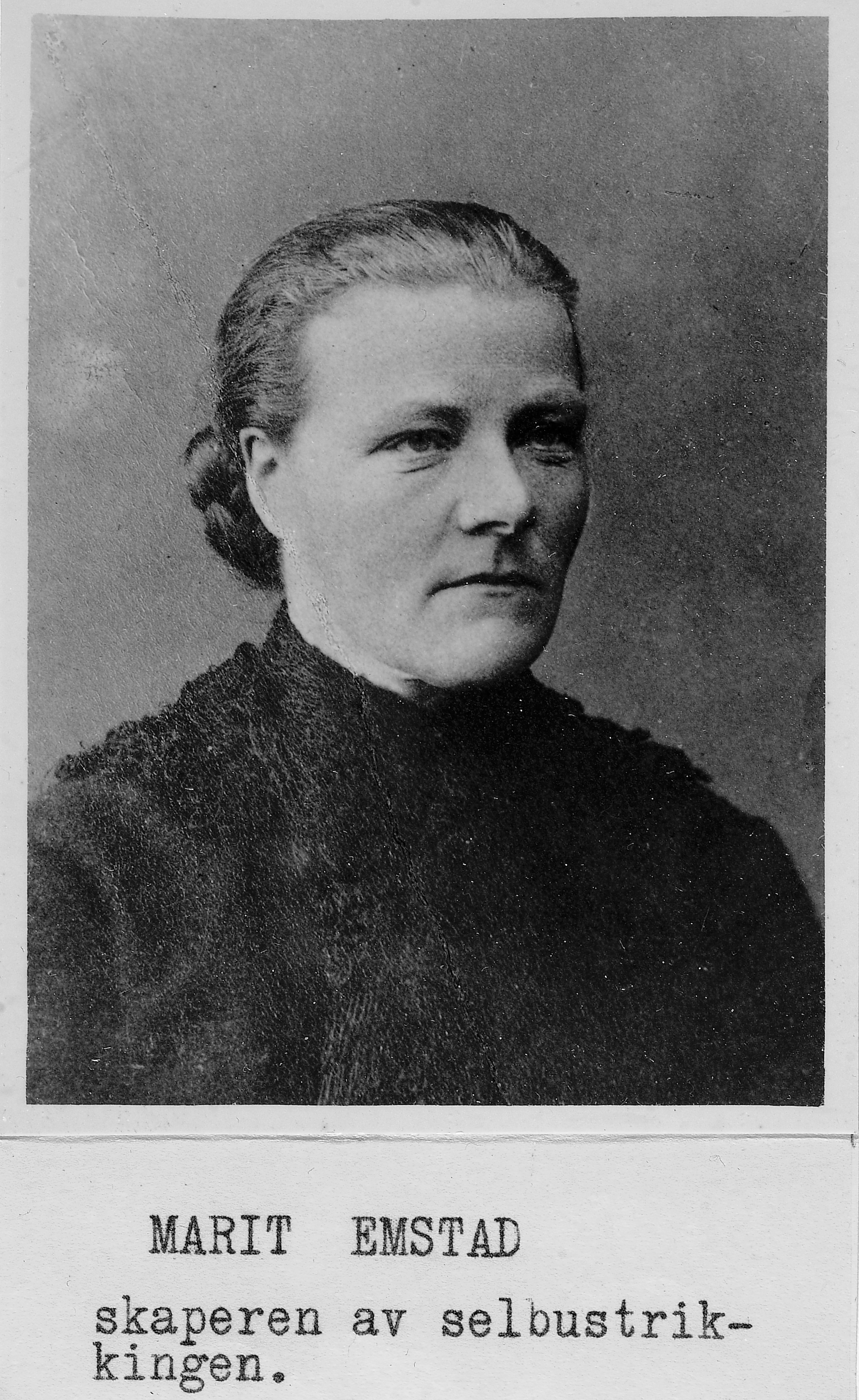 Bildet er hentet fra Arkivverket. Portrett av Marit Emstad (1841-1929). Arkivinstitusjon : Riksarkivet Arkivnavn : Landbruksdepartementet, Heimeyrkekontoret Sted : NORGE, Sør-Trøndelag, Selbu, Emneord: Strikking, Strikk, Håndarbeid, Kvinner, Selbustrikk Avbildet: Emstad, Marit